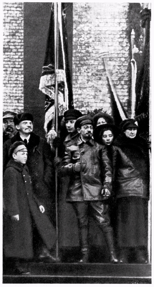 На демонстрации 7 ноября 1918 года на Красной площади стоят рядом под красным знаменем В.И. Ленин и Я.М. Свердлов.